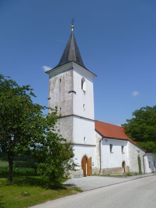 Kath. Filialkirche hl. Sixt